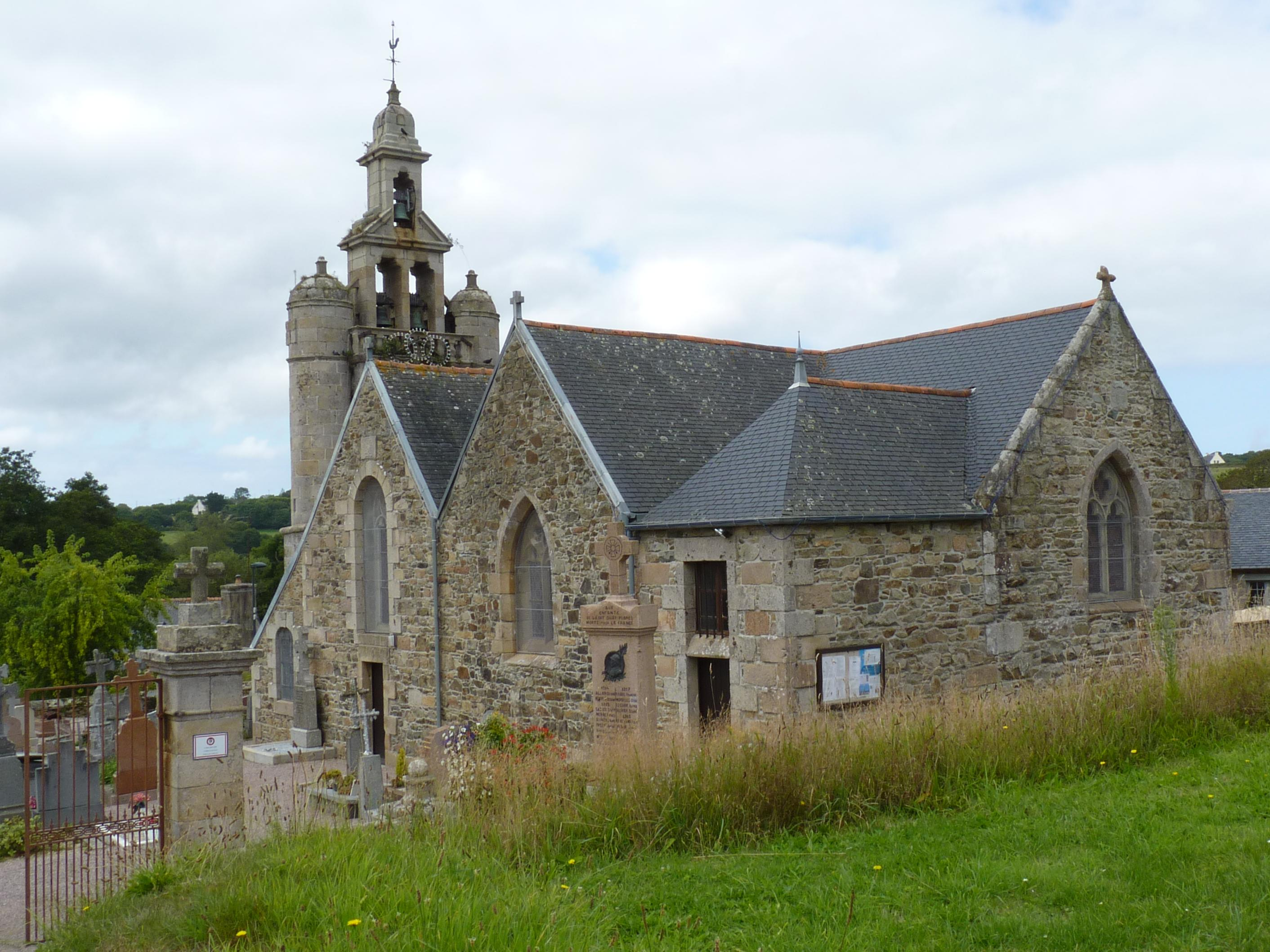 Eglise du XVIIème siècle située dans le bourg. Campanile reconstruit en 1882.